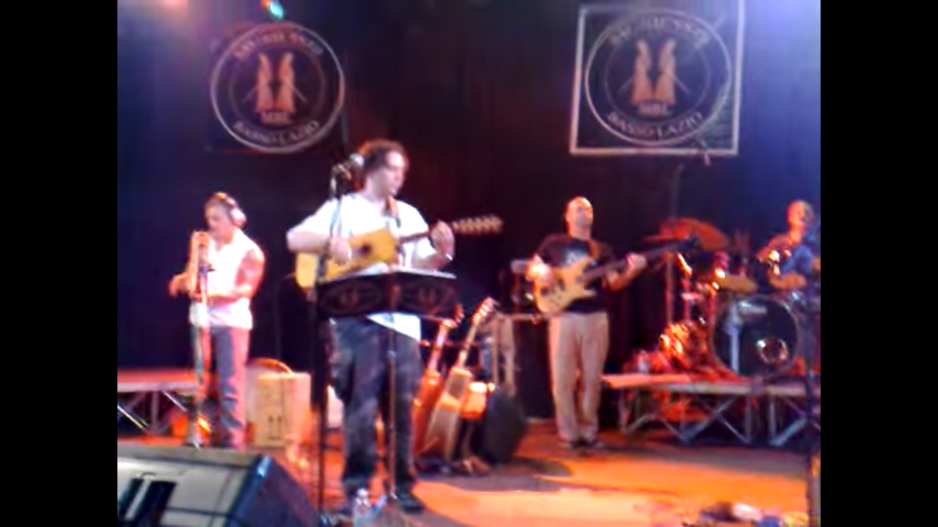 MBL live nell'estate del 2009